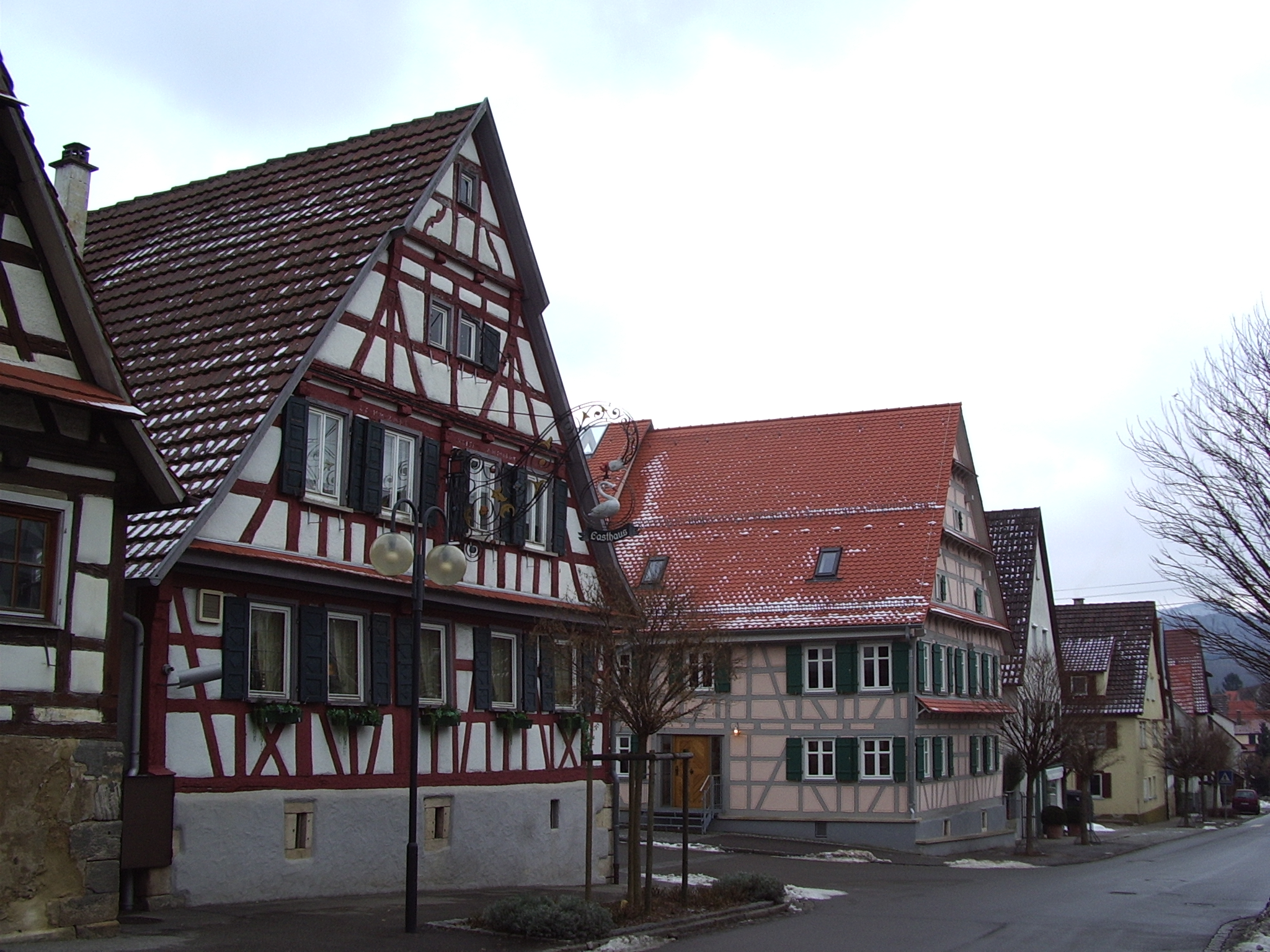 Casas típicas de Nehren